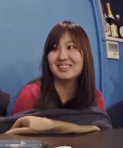 久木田かな子（ラボガ三姉妹より）